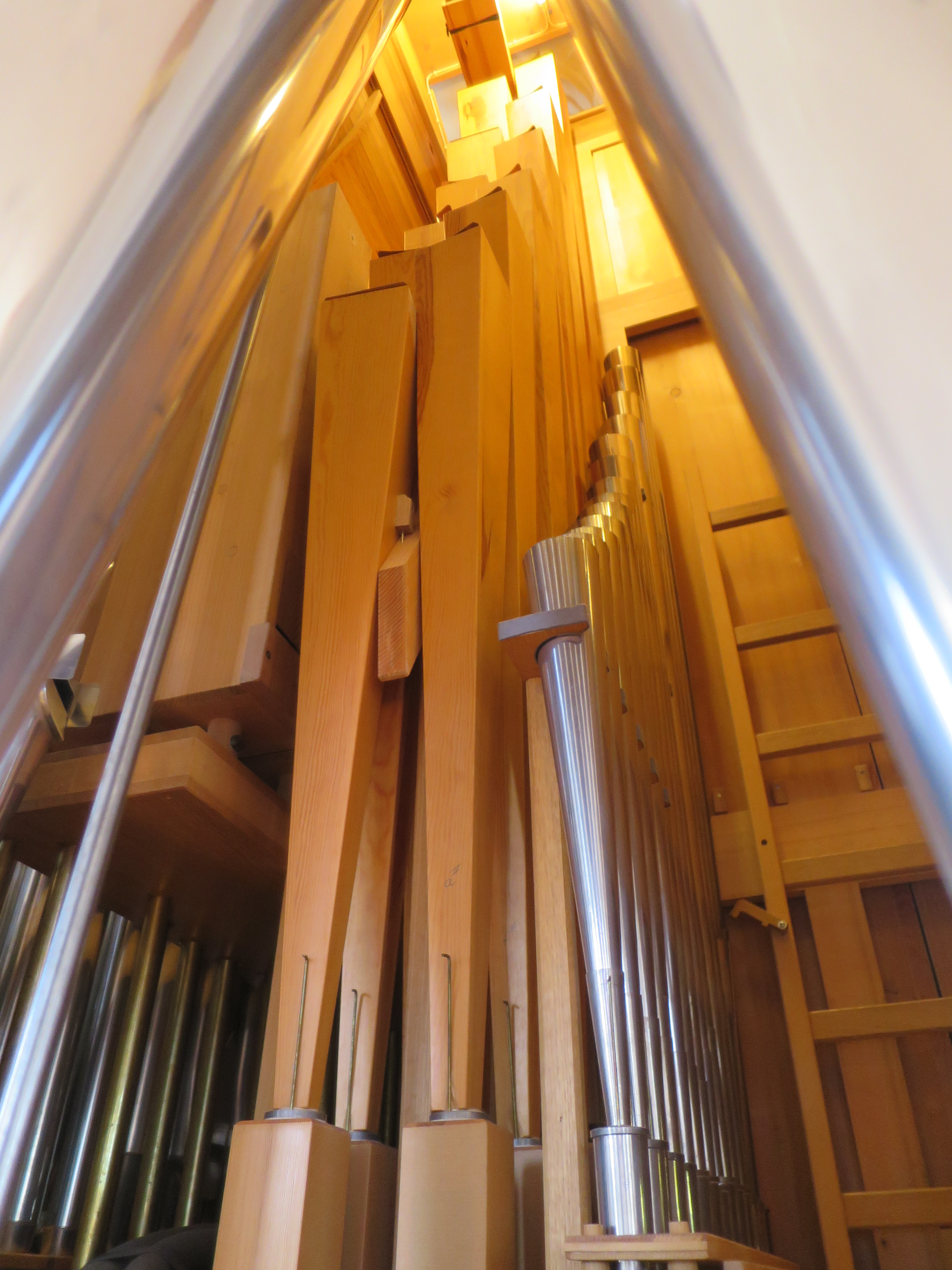 Reformierte Kirche Wädenswil - Trompete 8' und Posaune 16' (Holz) im Pedalwerk